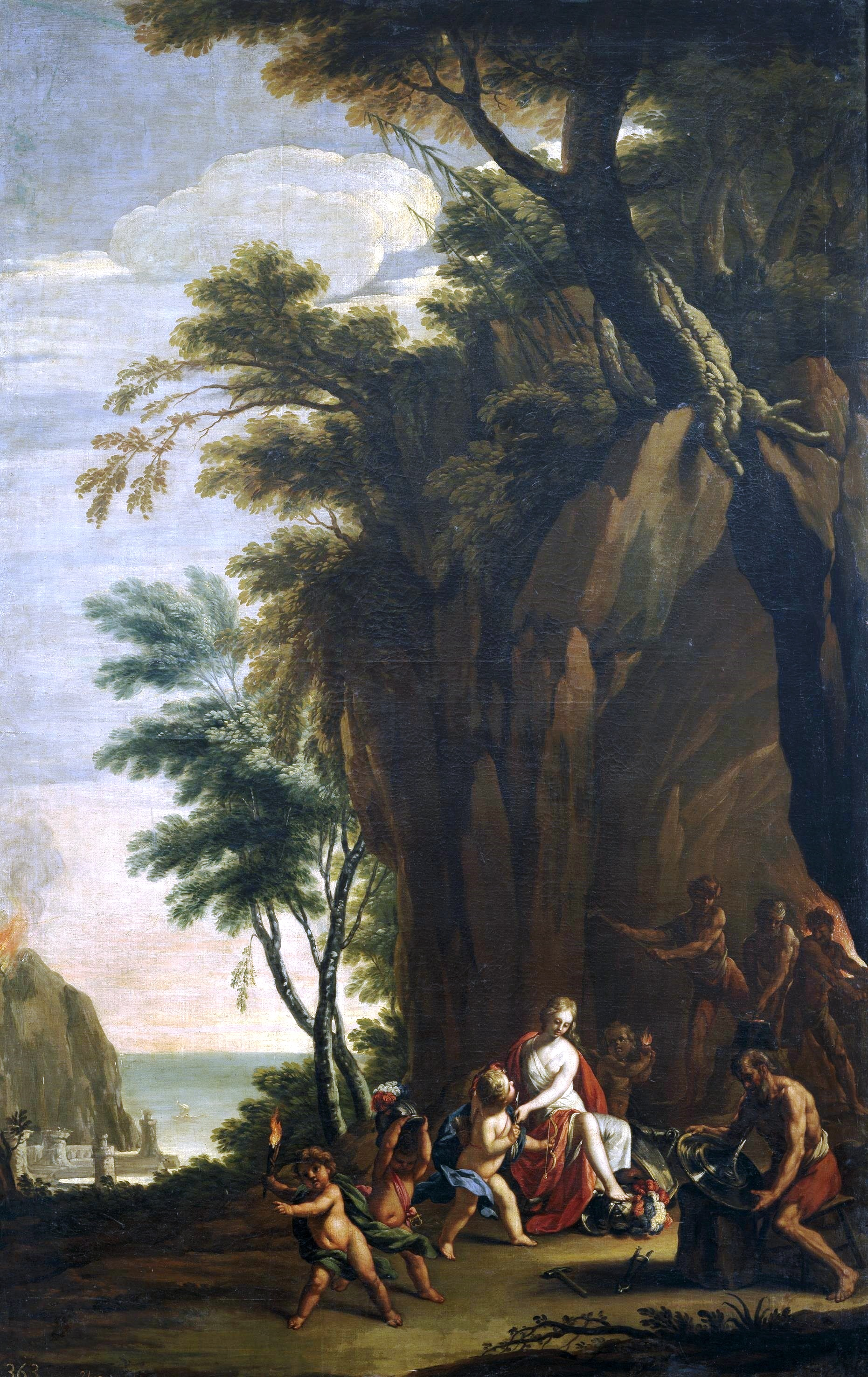 La obra es una alegoría del Fuego.